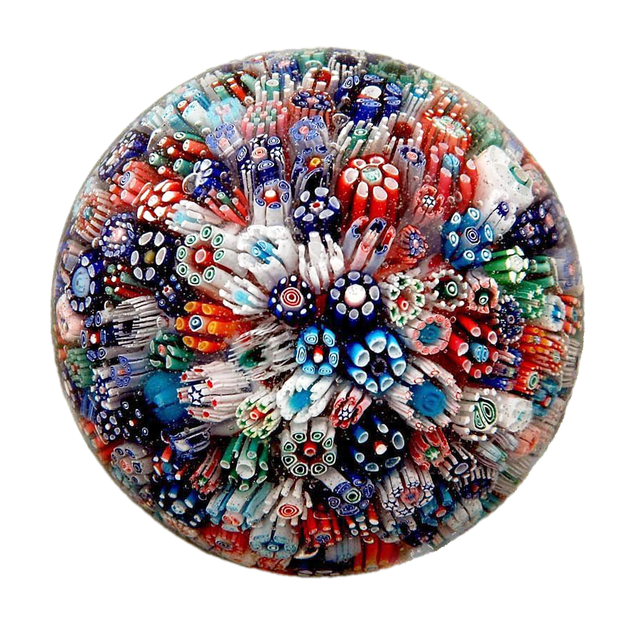 Glasmuseum Wertheim, Deutschland, Main-Tauber-Kreis, Gründung 1976, Objekt: Paperweight-Kabinett: Millefiori-Paperweight, Schlesien, um 1840, aus der Sammlung Peter von Brackel